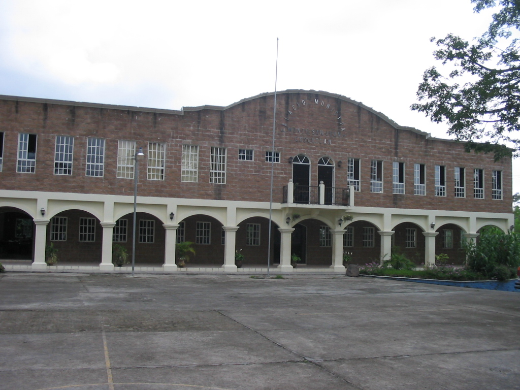 Verdadero Palacio Municipal de Monte San Juan,Cuscatlan. Muy al estilo de la Capitania General de Guatemala.